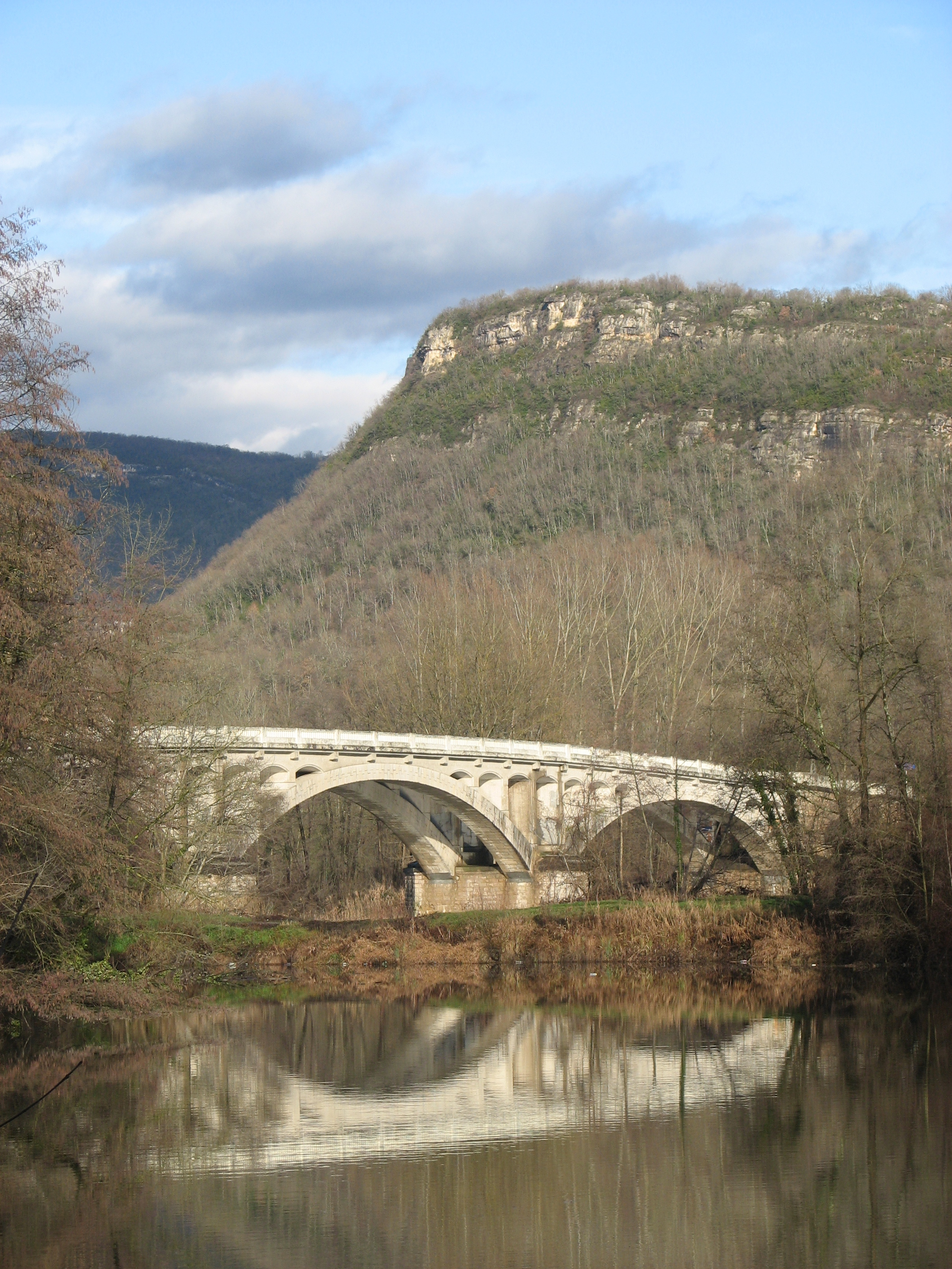 Le pont de Cordon (Brégnier-Cordon à Aoste), avec le mont de Cordon au-dessus